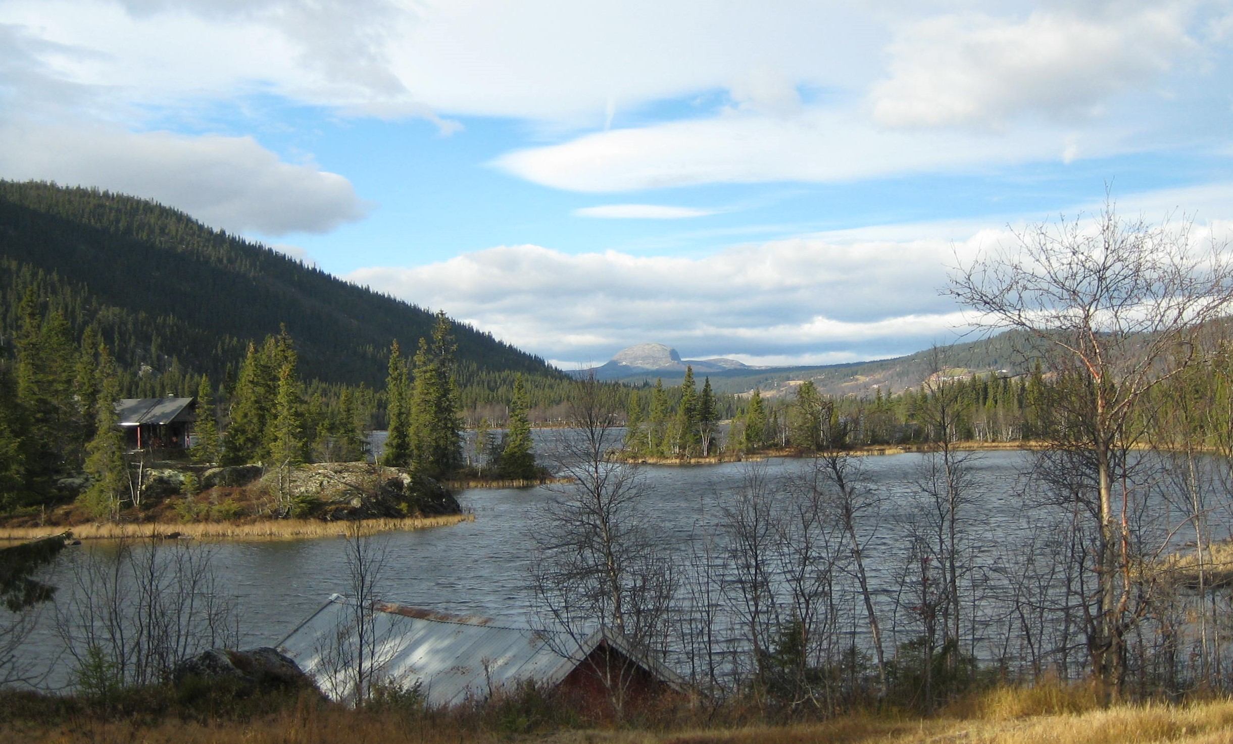 Steinsetfjorden med Rundemellen bakerst.